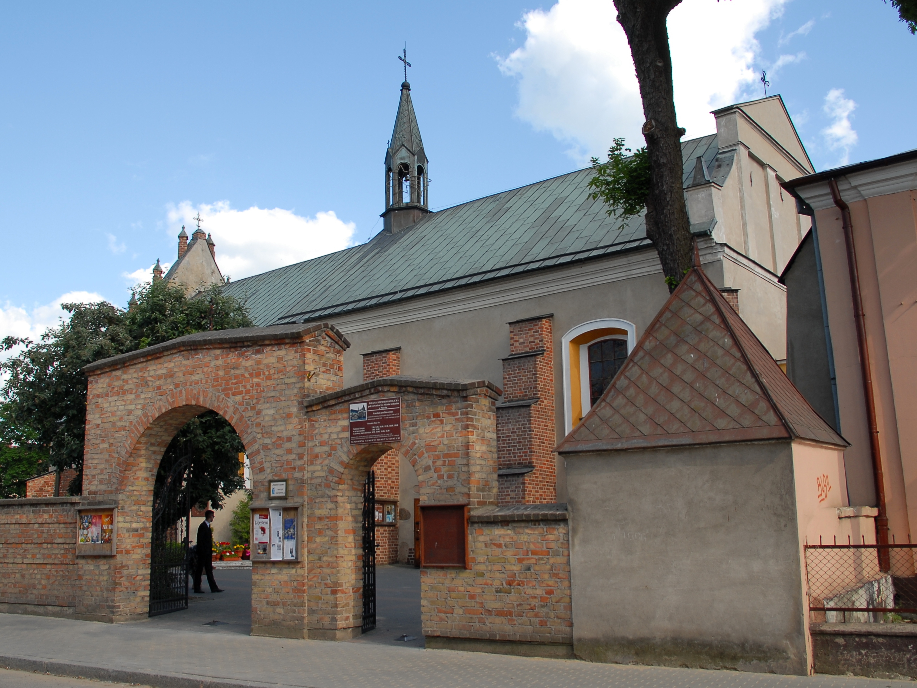 Płońsk - kościół parafialny pw. św. Michała Archanioła w zespole klasztornym karmelitów (zabytek nr rejestr. A-60)